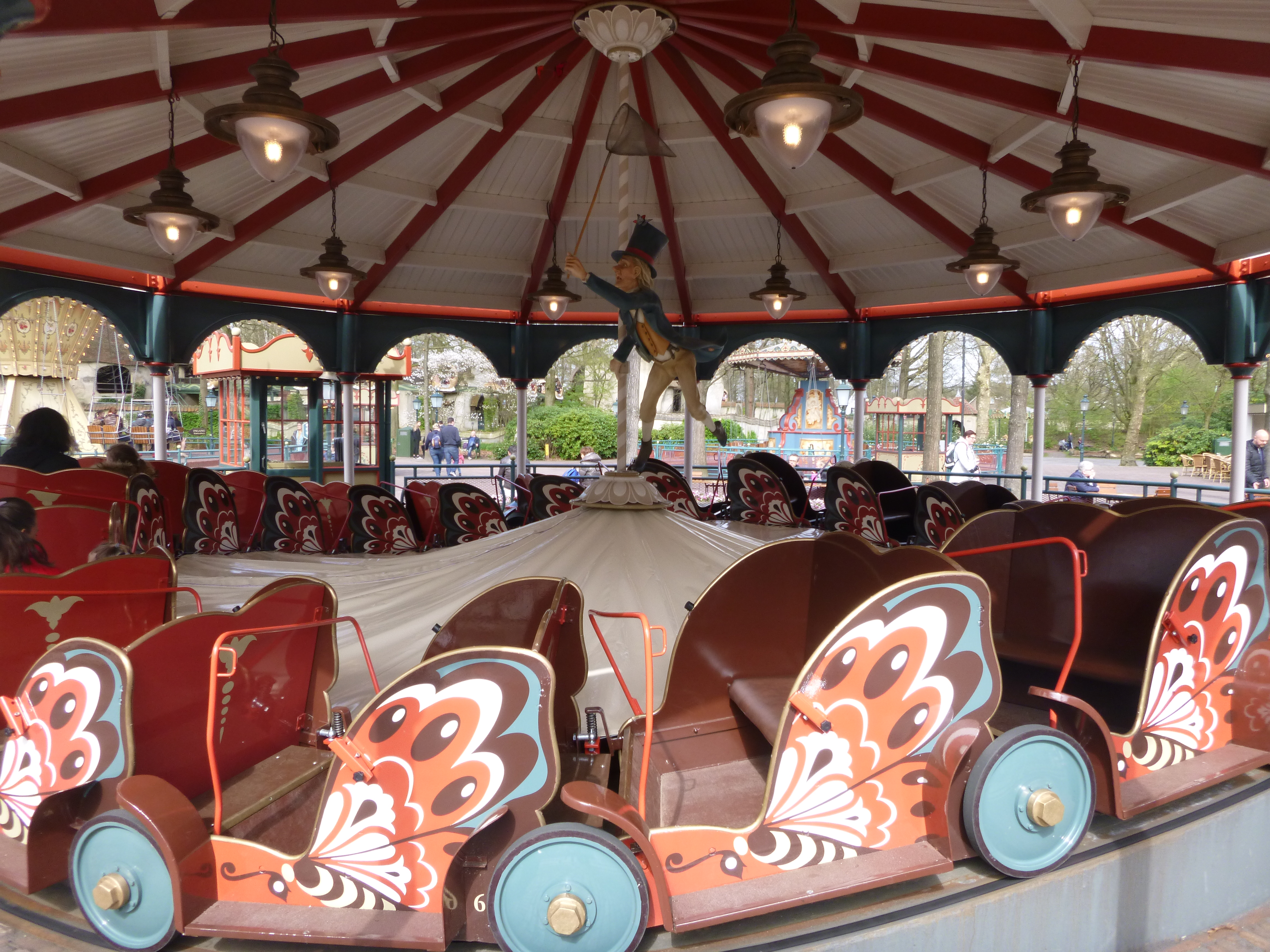 Manège papillons Efteling